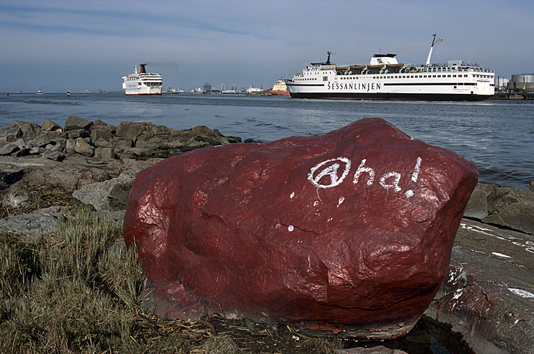 Närbild på stenen, passagerarbåtar i bakgrunden. Motiv: Göteborg 194:1 Kategori: Hamnområde, Sjöfart Närbild på stenen, passagerarbåtar i bakgrunden. Göteborg 194:1.